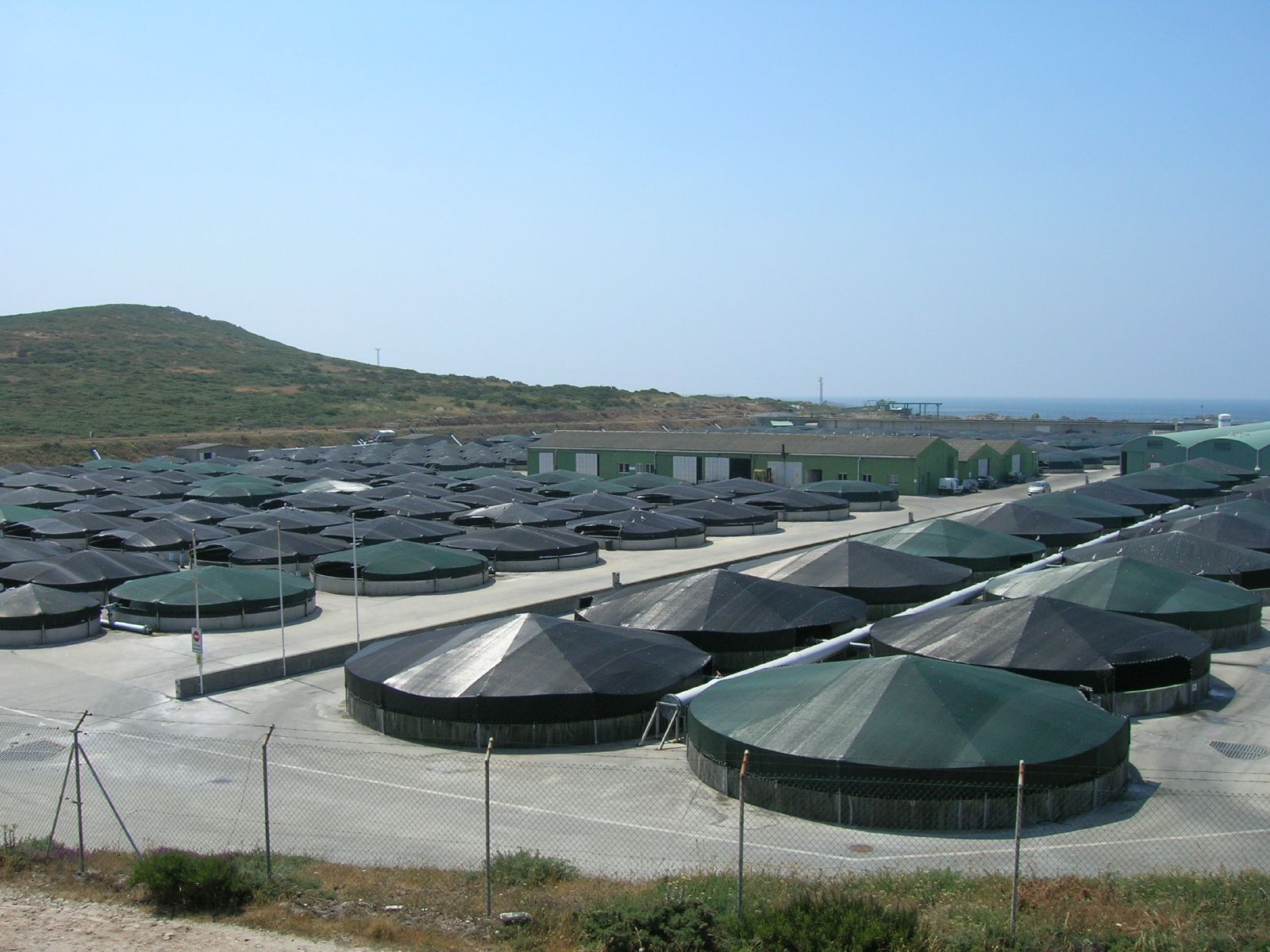 Piscifactoría de rodaballo, Lira, Carnota